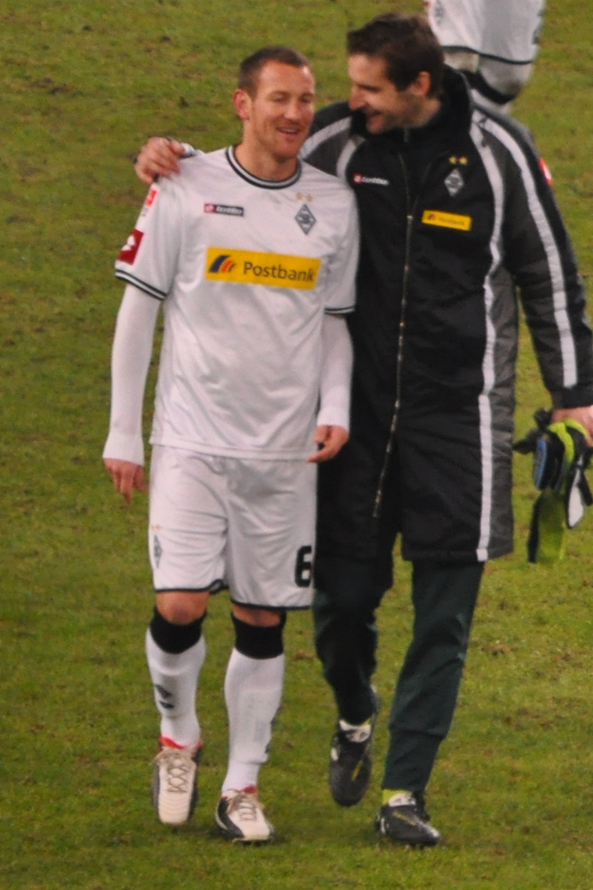 Michael Fink mit Ersatztorwart Heimeroth